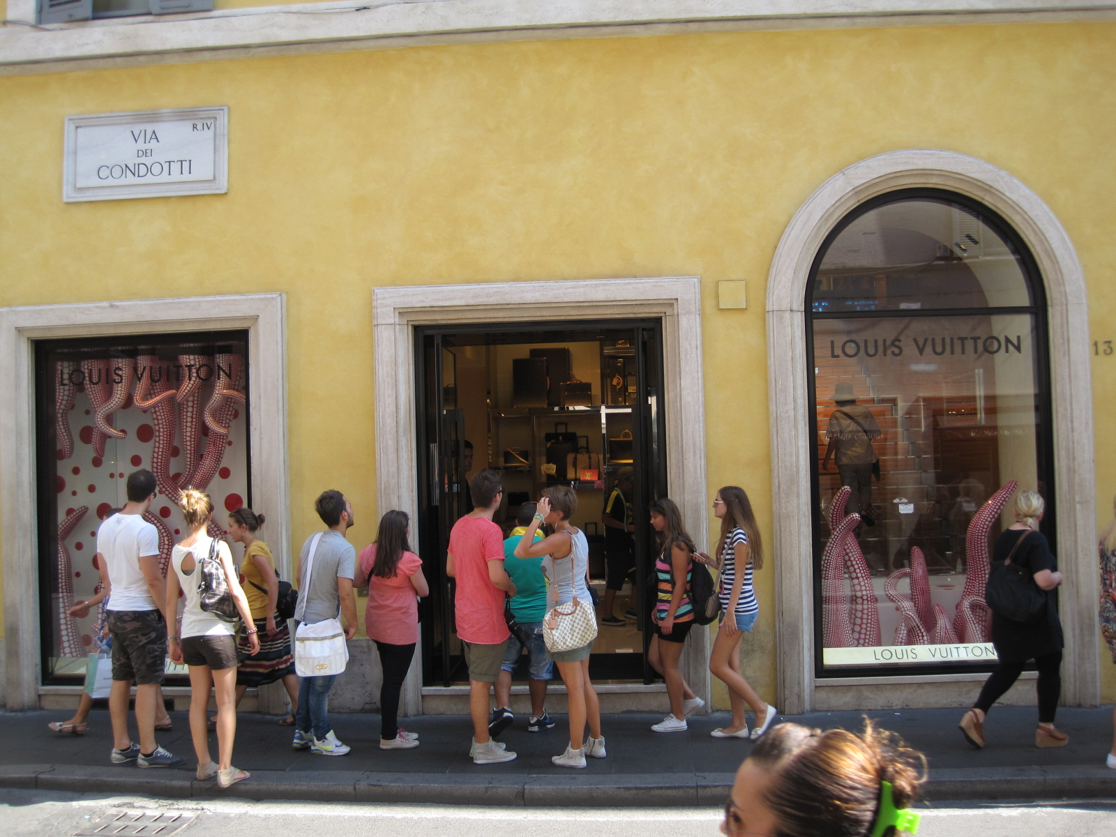 Boutique Louis Vuitton de Rome